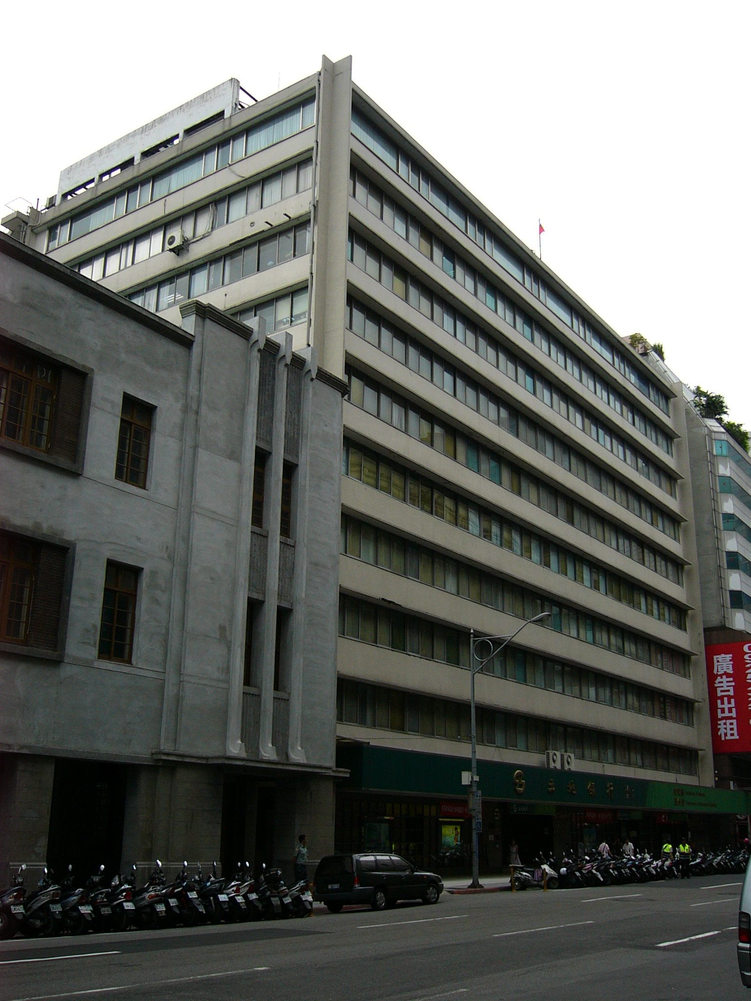 臺灣土地銀行總行，位於臺北市中正區館前路46號。